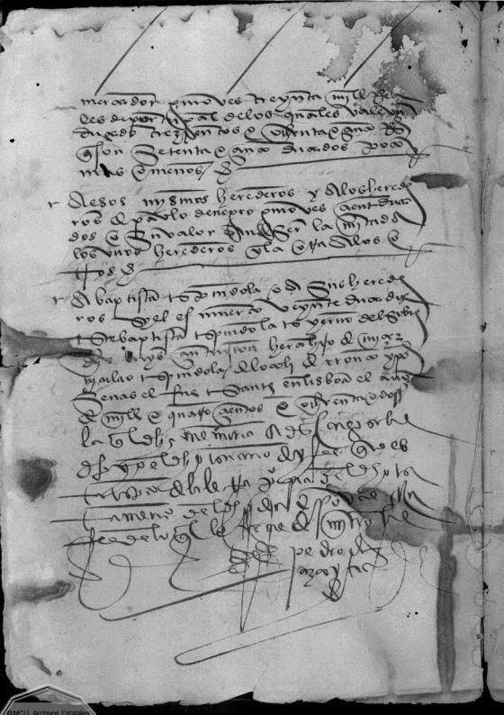 1506 codicil of Christopher Columbus Transcription by Manuel da Silva Rosa: mercader ginovés, treinta mil reales de Portugal, de los cuales vale un ducado trescientos ochenta y cinco reales, que son setenta y cinco ducados poco más o menos. A esos mismos herederos y a los herederos de Paulo Negro, ginovés, cien ducados o su valor; han de ser la mitad a los unos herederos y la otra a los otros. A Baptista Espínola o a sus herederos, si él es muerto, veinte ducados. Este Baptista Espínola es yerno del sobredicho Luis Centurión. Era hijo de Miçer Nicolao Espínola de Locoli de Ronco, y por senas él fue estante en Lisboa el año de mil cuatrocientos ochenta y dos. La cual dicha memoria a descargo sobredicho, yo el escrivano doy fe que estaba escripta de la letra propia del dicho testamento del dicho don Cristóbal, en fe de lo cual lo firmé de mi nombre. Pedro de Azcoitia